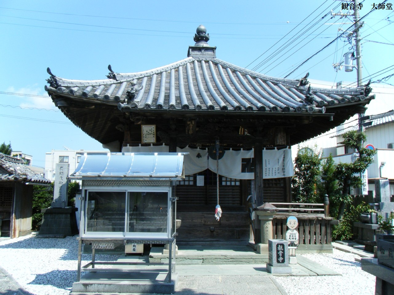 観音寺の大師堂